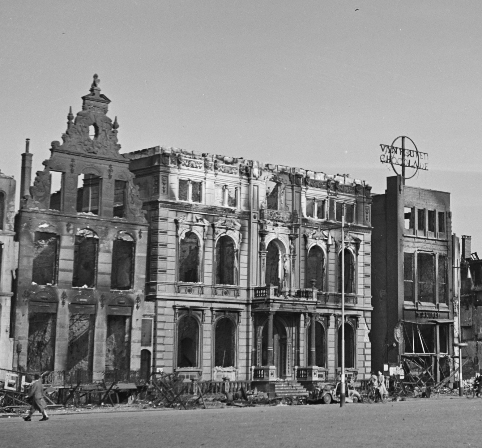 Collectie / Archief : Fotocollectie Anefo Reportage / Serie : Front Noord-Oost Nederland: Groningen-Friesland Beschrijving : Verwoeste panden aan de oostzijde van de Grote Markt te Groningen. Het centrum van de stad werd zwaar beschadigd tijdens de gevechten op 16 april 1945 - Scholtenhuis (r.). Datum : april 1945 Locatie : Groningen (provincie), Groningen (stad) Trefwoorden : gebouwen, verwoestingen Fotograaf : Poll, Willem van de / Anefo, [onbekend] Auteursrechthebbende : Nationaal Archief Materiaalsoort : Negatief (zwart/wit) Nummer archiefinventaris : bekijk toegang 2.24.01.03 Bestanddeelnummer : 900-2653